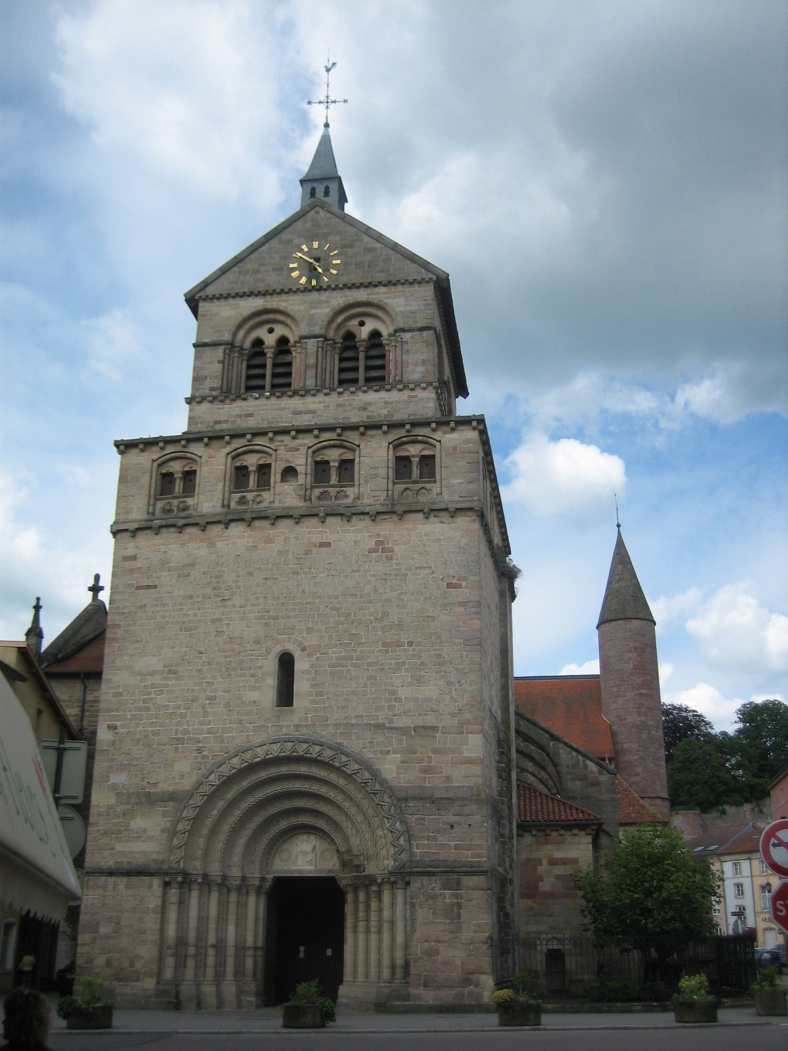 Basilique Saint-Maurice, tour porche, face occidentale, Épinal, France